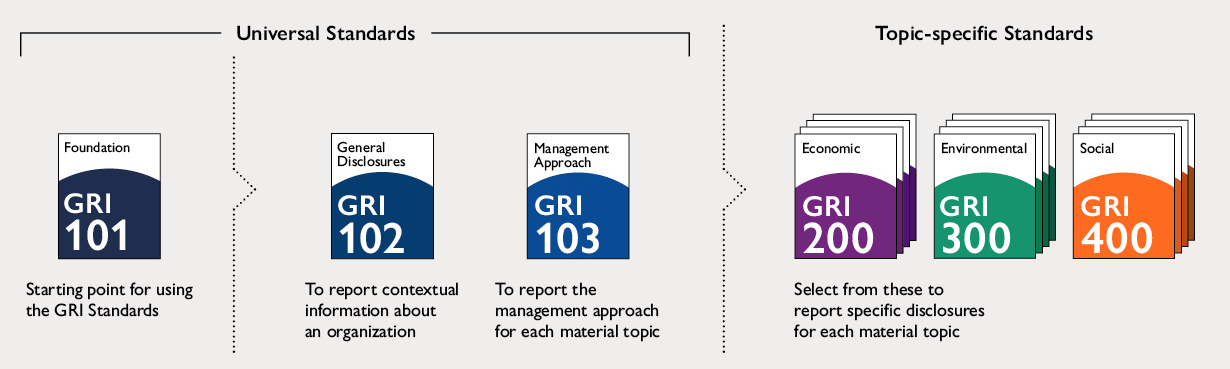 Lo schema illustra quali sono gli standards usati universalmente e quali fanno parte di specifici ambiti.